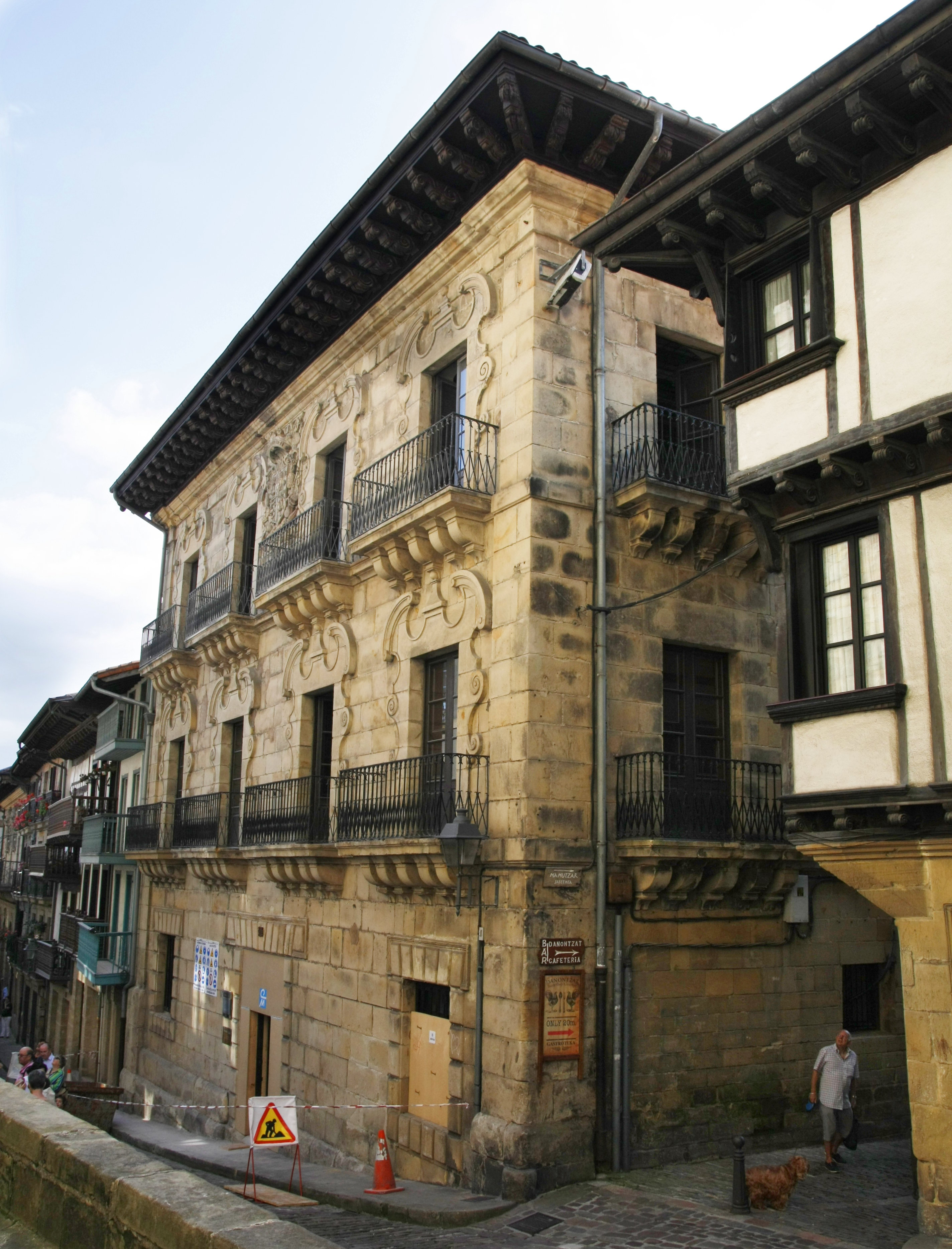 Zuloaga jauregia - Hondarribia